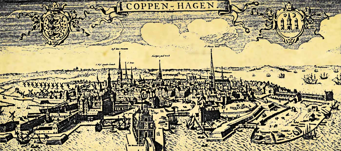 Kupferstich Kopenhagen